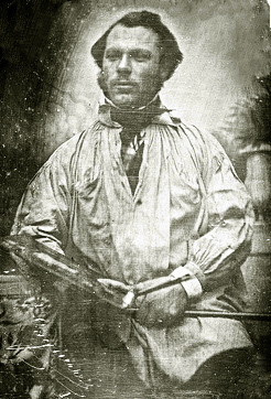 Photographie du peintre Hippolyte Sebron par Louis Daguerre.